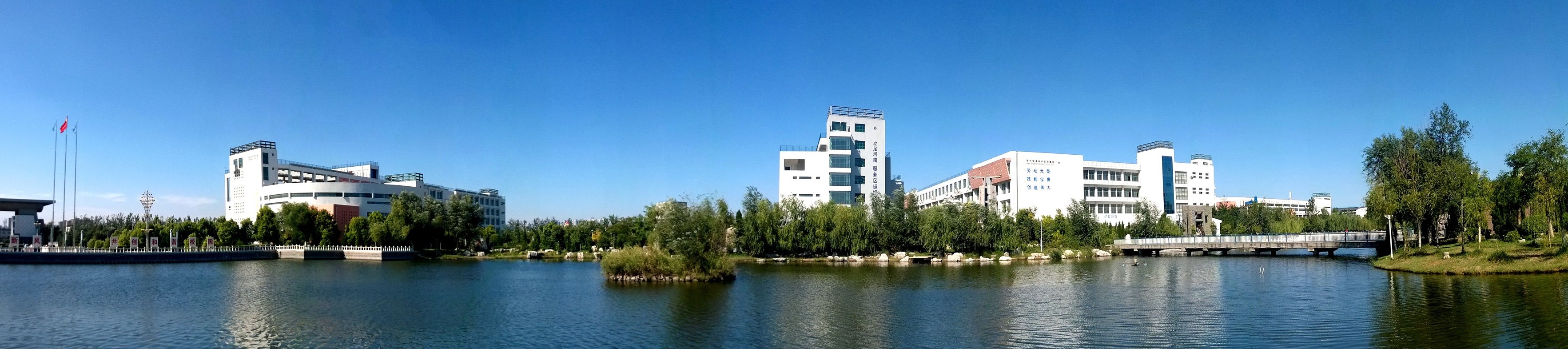 黄河水利职业技术学院 中心湖全景